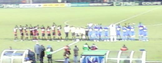 Présentation des équipes lors du match JA Drancy-OGC Nice du 02 février 2011 au stade Marville de la Courneuve